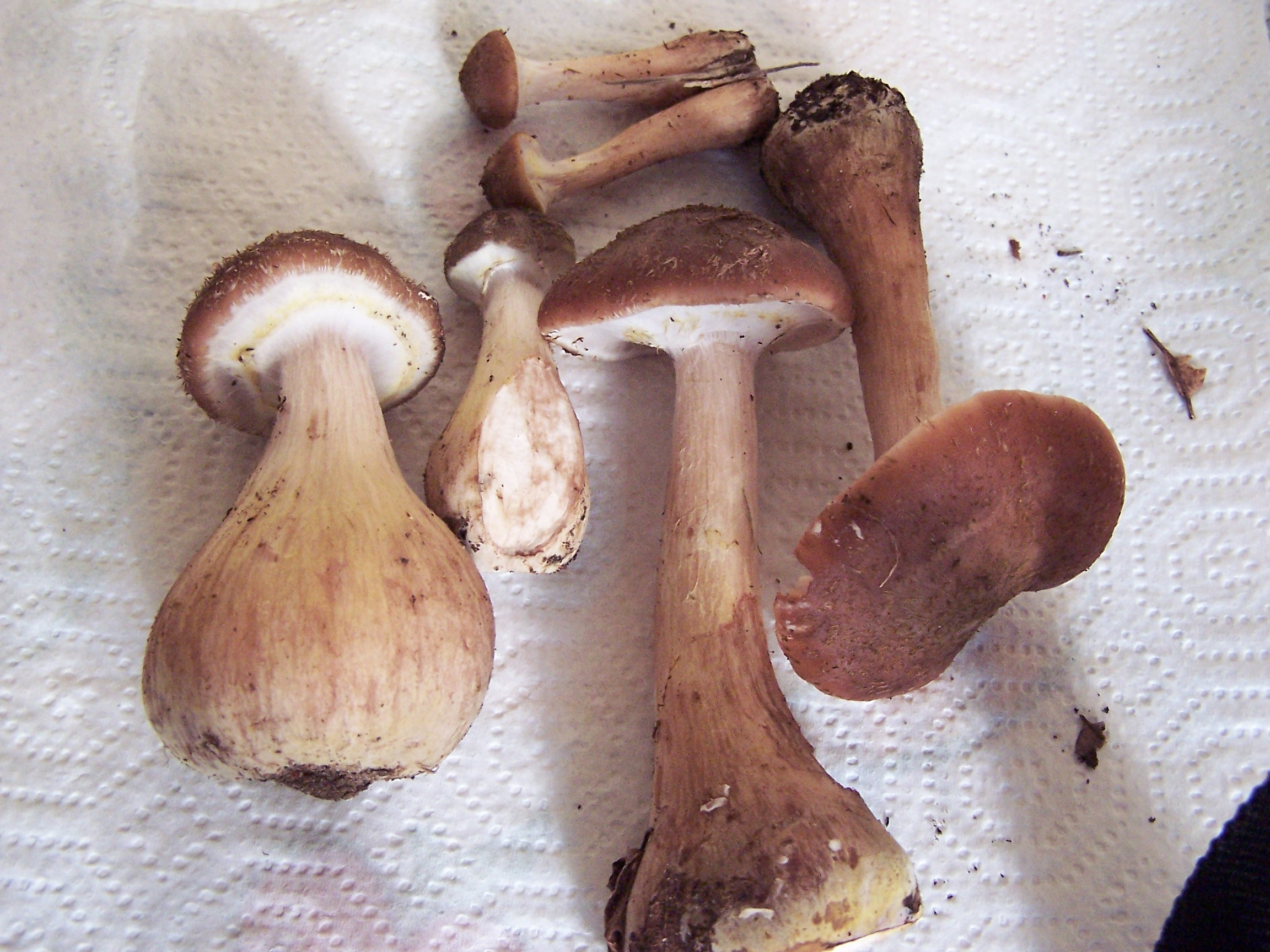 Armillaria gallica (A. bulbosa)